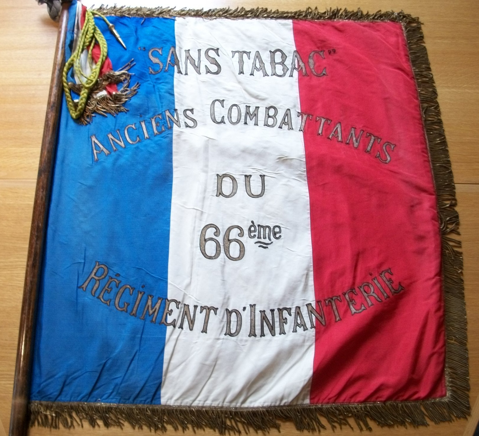 Drapeau des anciens combattant du 66e régiment d'infanterie.